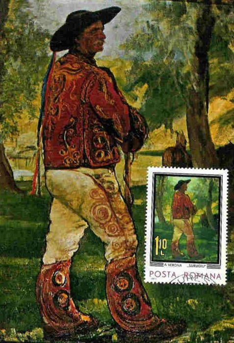 Surugiu - ilustrată - carte poștală